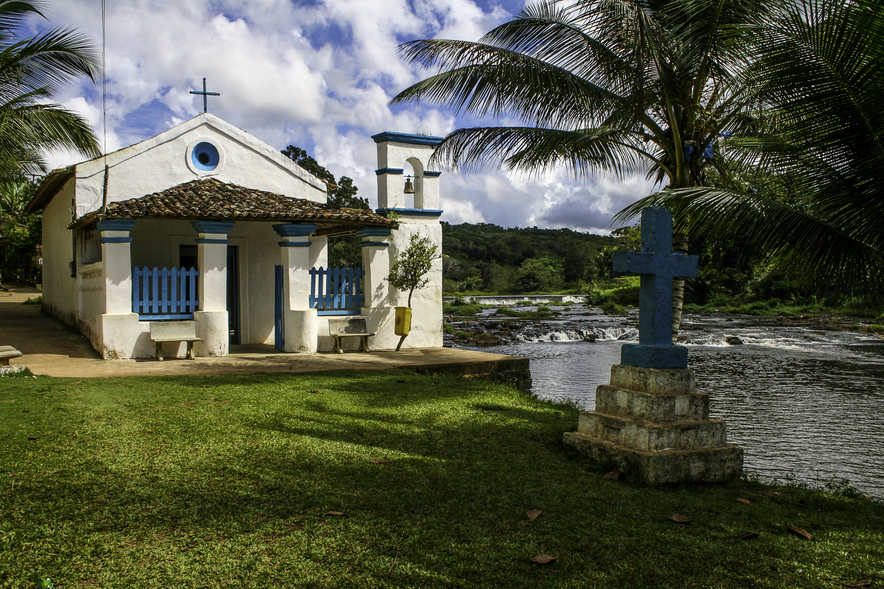 B: Igreja N. Sra. da Escada (Tombada apenas a Capela de Santana, no rio Santana ou do Engenho)